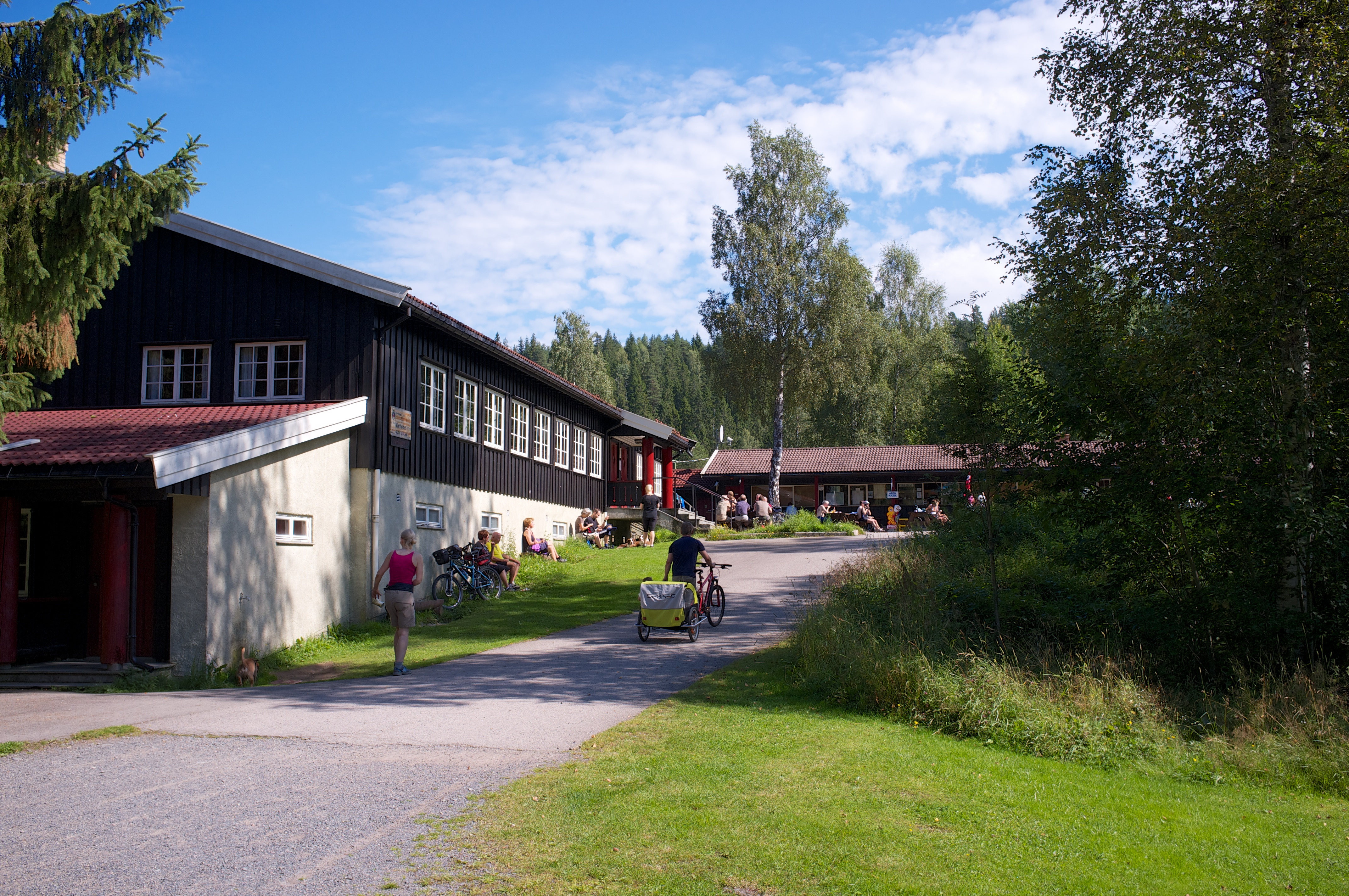 Mariholtet i Østmarka.